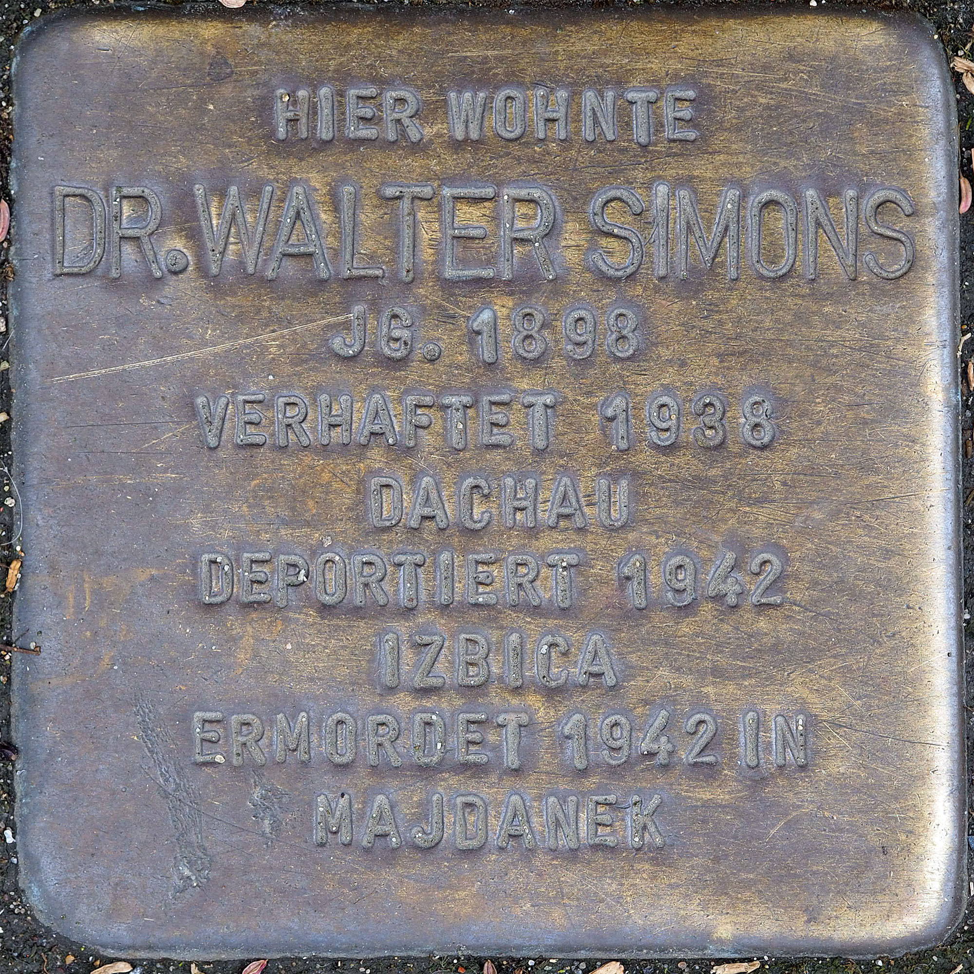 Stolpersteine MG: Simons, Walter